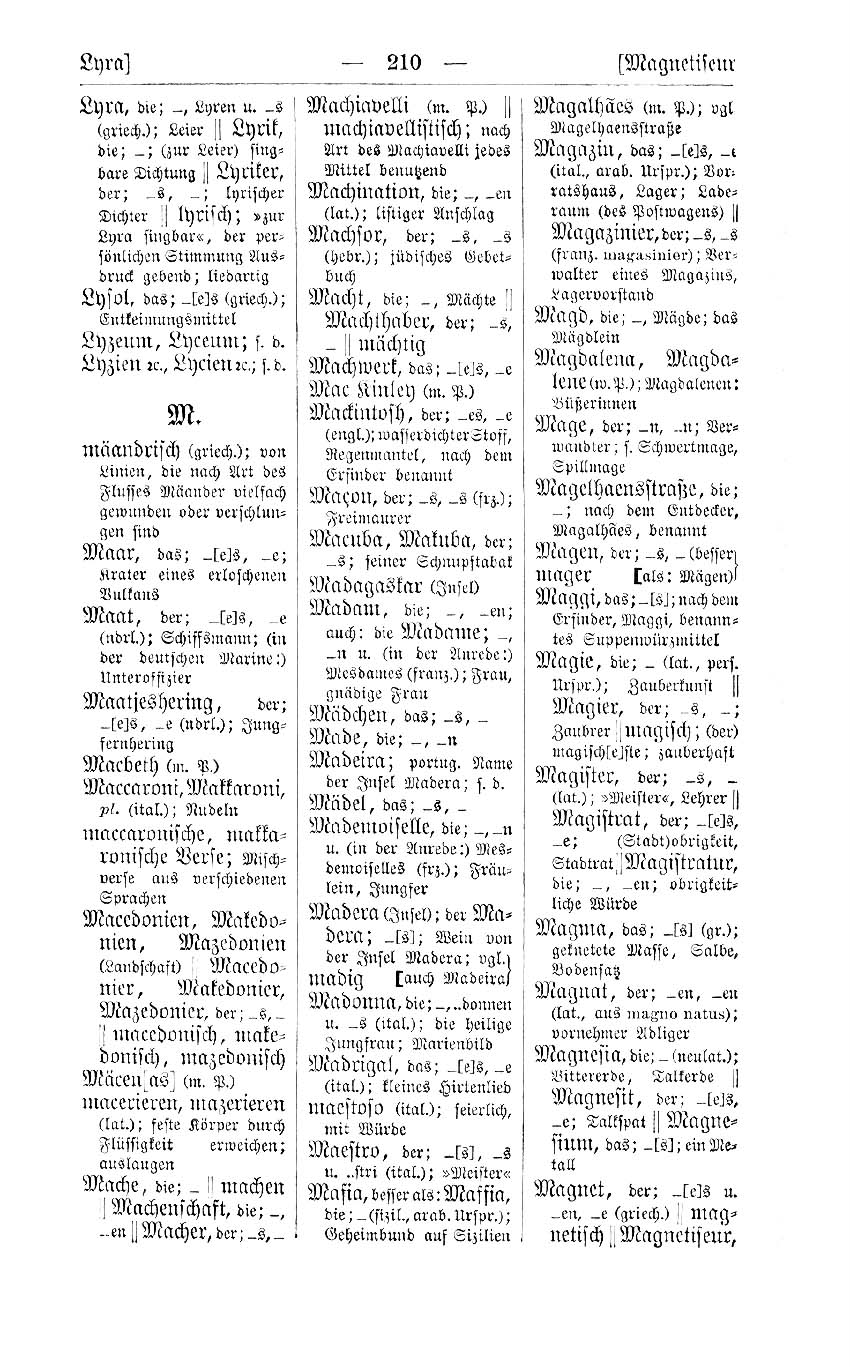 Seite 210 von Konrad Duden: Orthographisches Wörterbuch der deutschen Sprache. Leipzig 1902.